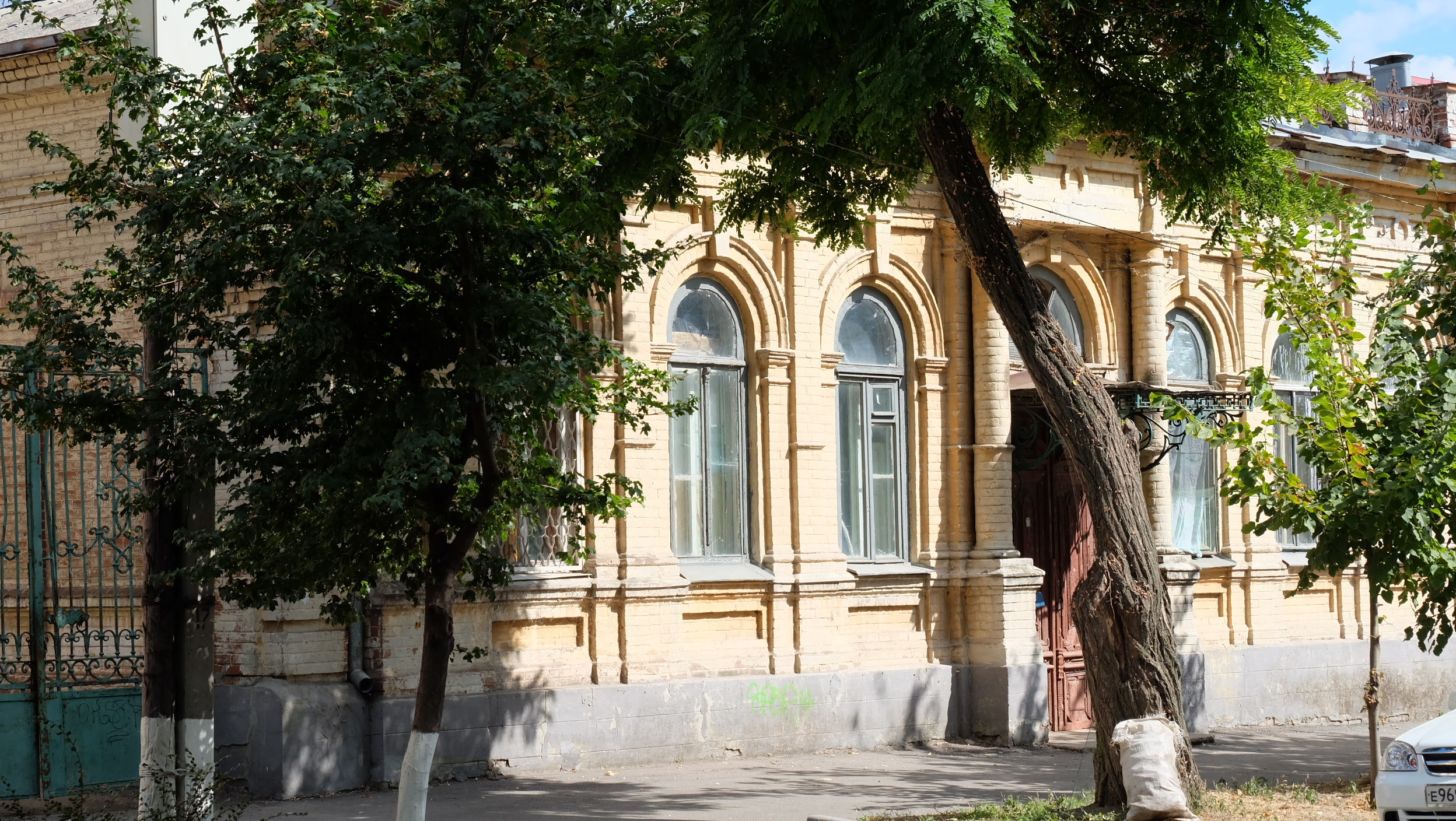 Жилой дом, комплекс застройки улицы: улица Греческая, 32, Таганрог, Ростовская область